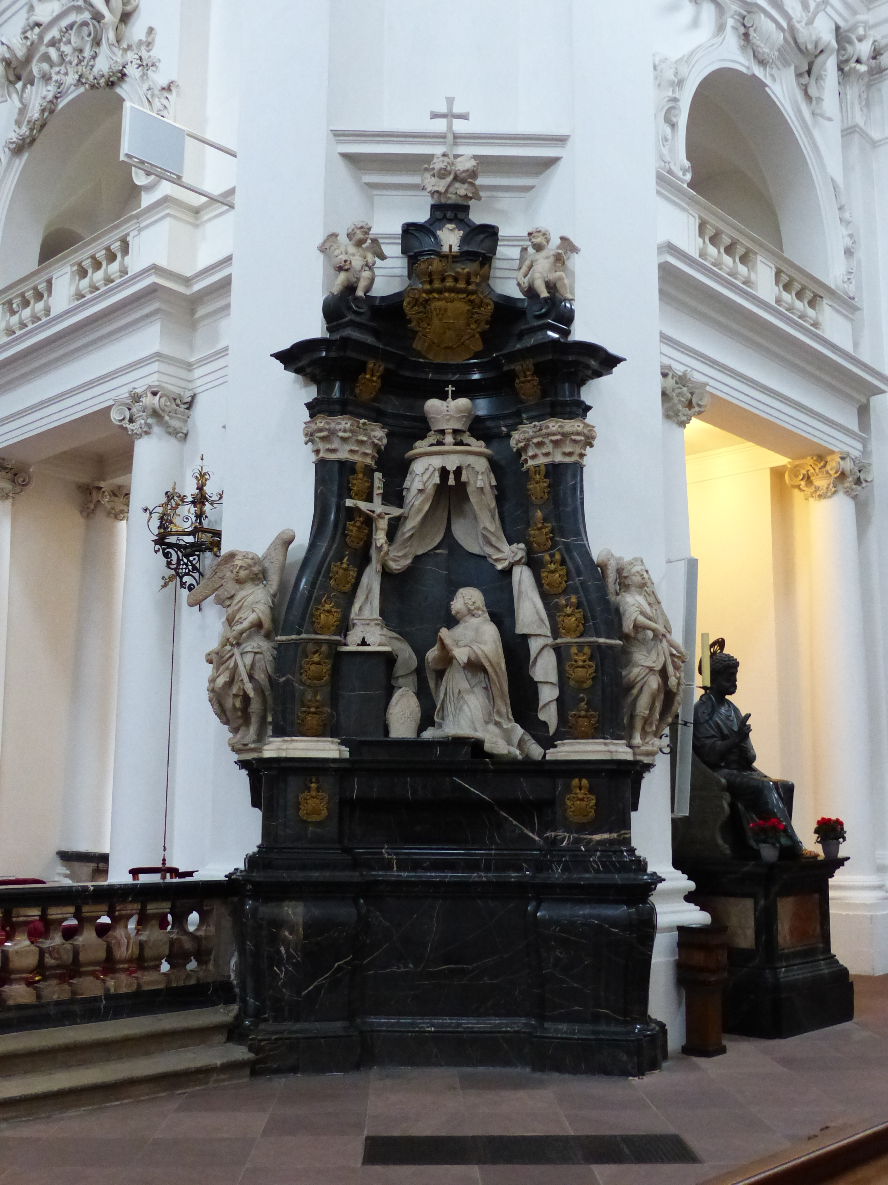 Dom St. Salvator zu Fulda - Epitaph noch zu Lebzeiten Abt Adolphs von Dalberg (1678-1737)